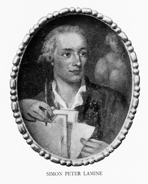 Peter Simon Lamine (1738-1817), Druckgraphik, Bayerische Staatsbibliothek München/Bildarchiv